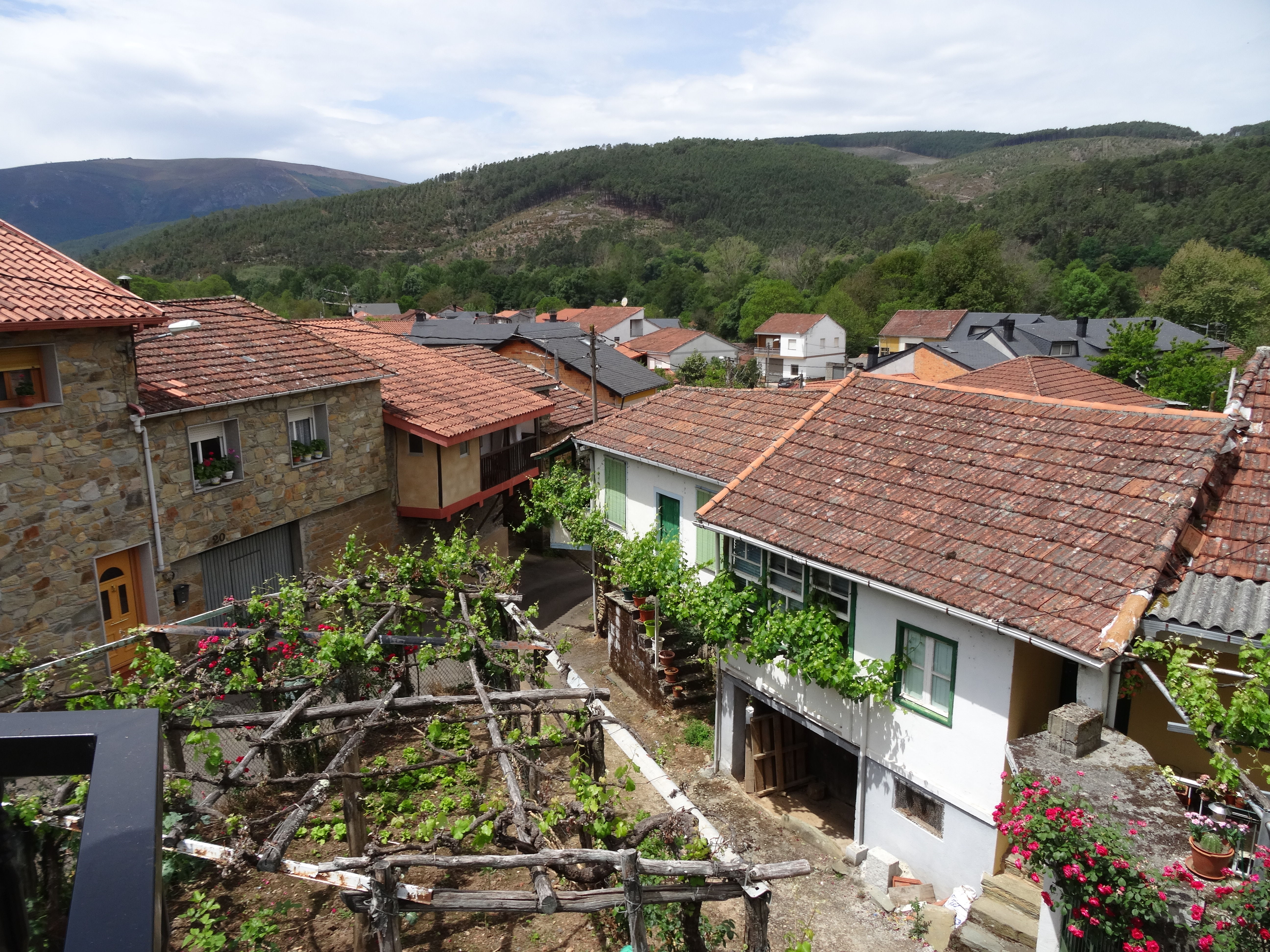 Ver título.